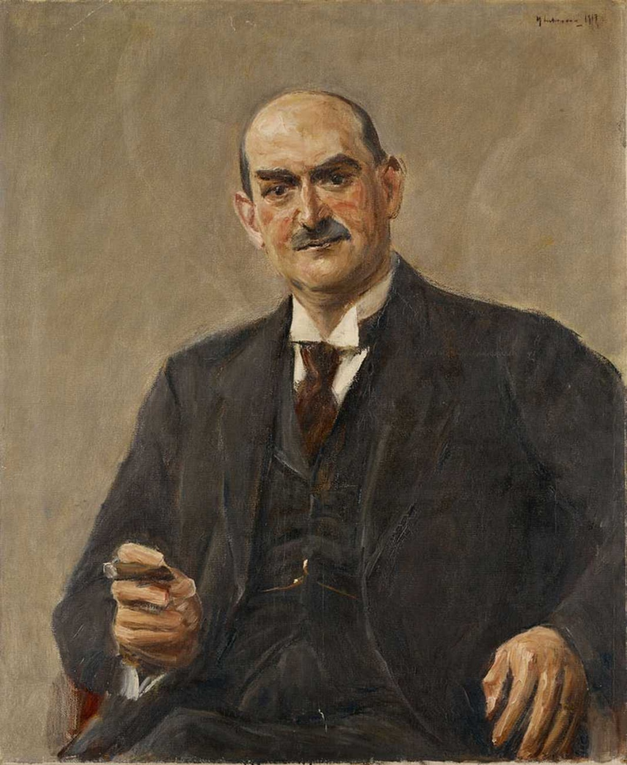 Portrait Kommerzienrat Dr. Carl Leopold Netter